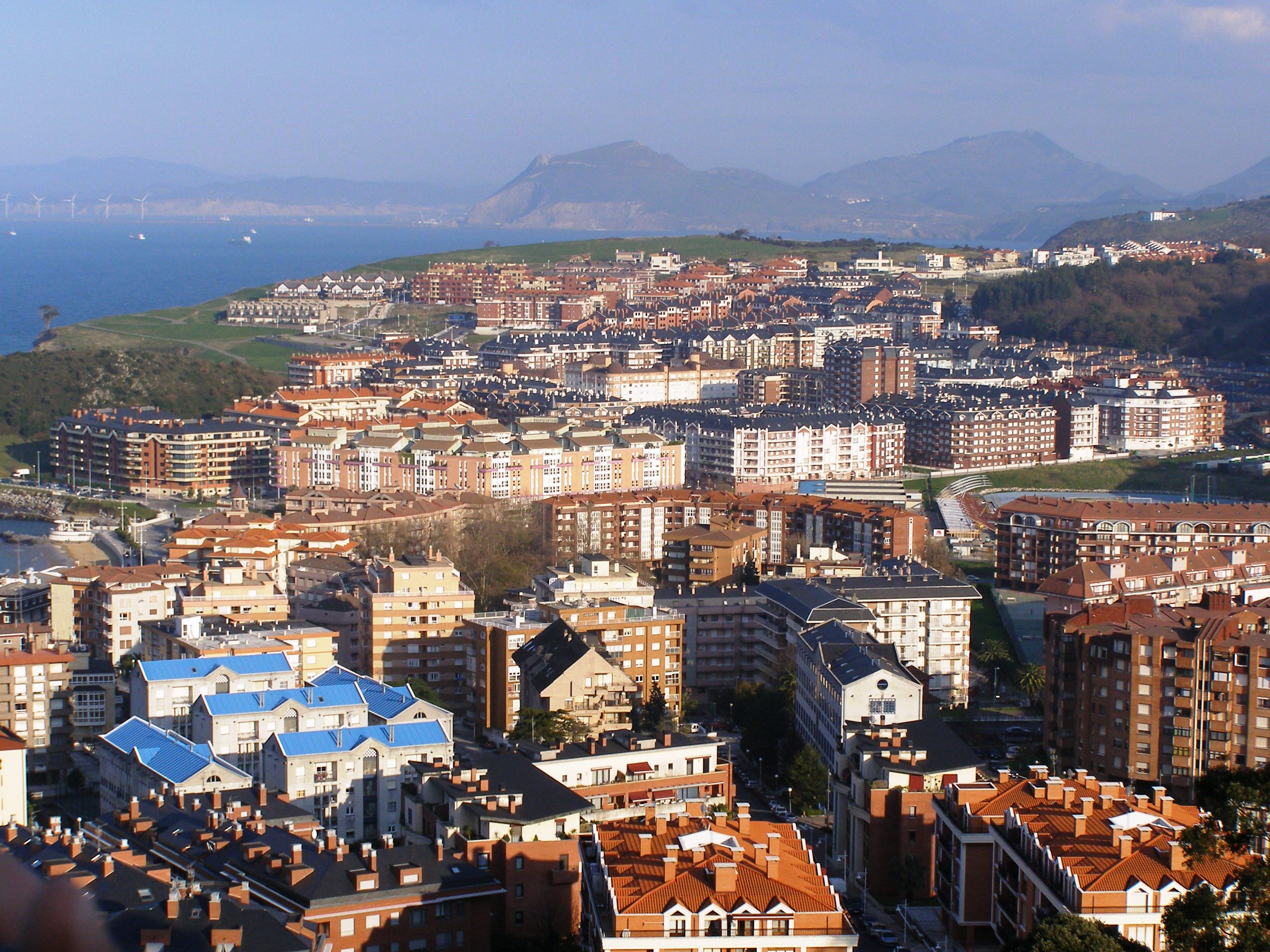 Vista del sureste de Castro Urdiales